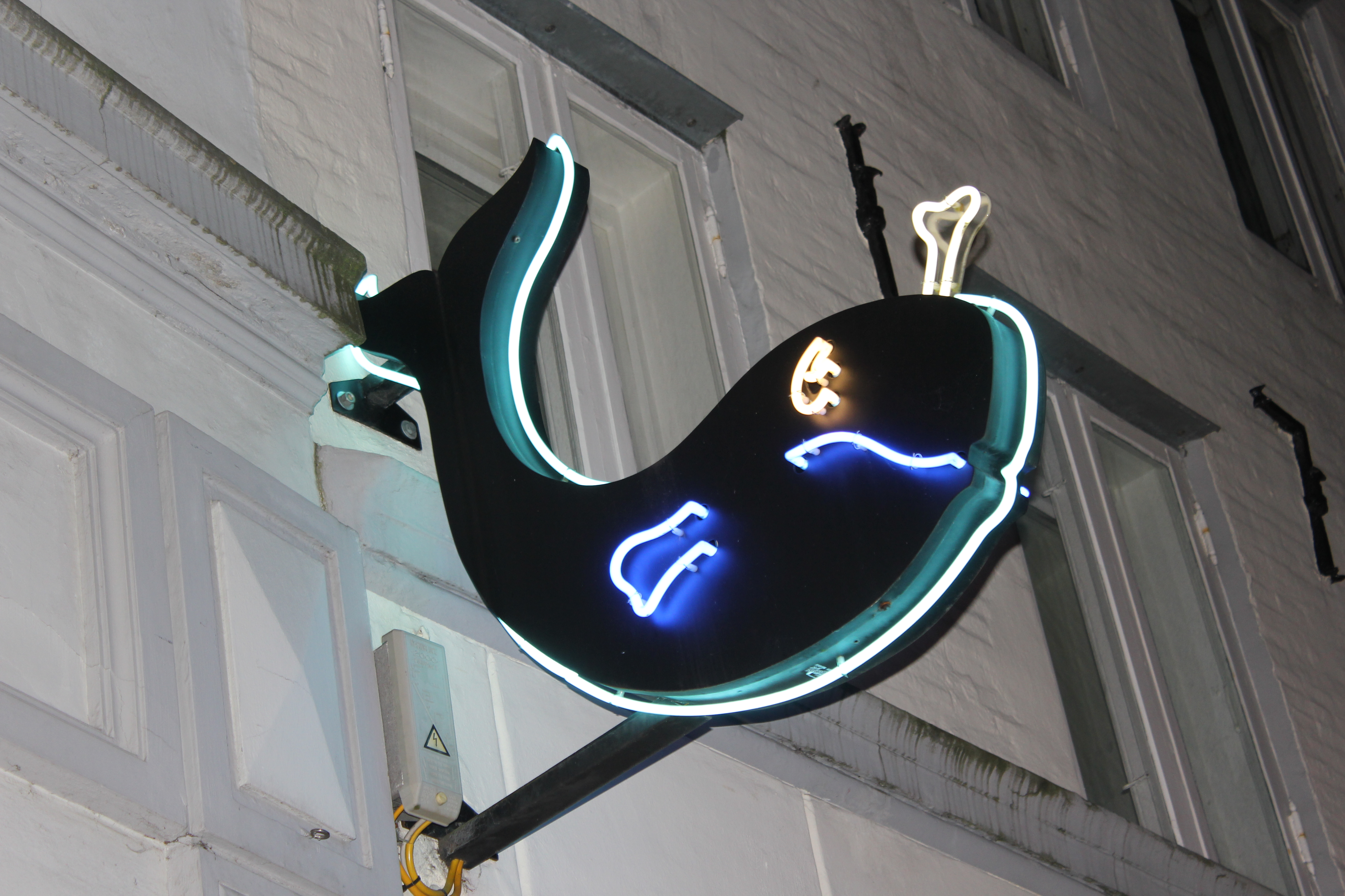 Der schwarze Walfisch am Gasthaus Schwarzer Walfisch, Angelburger Straße 44, Bild 03